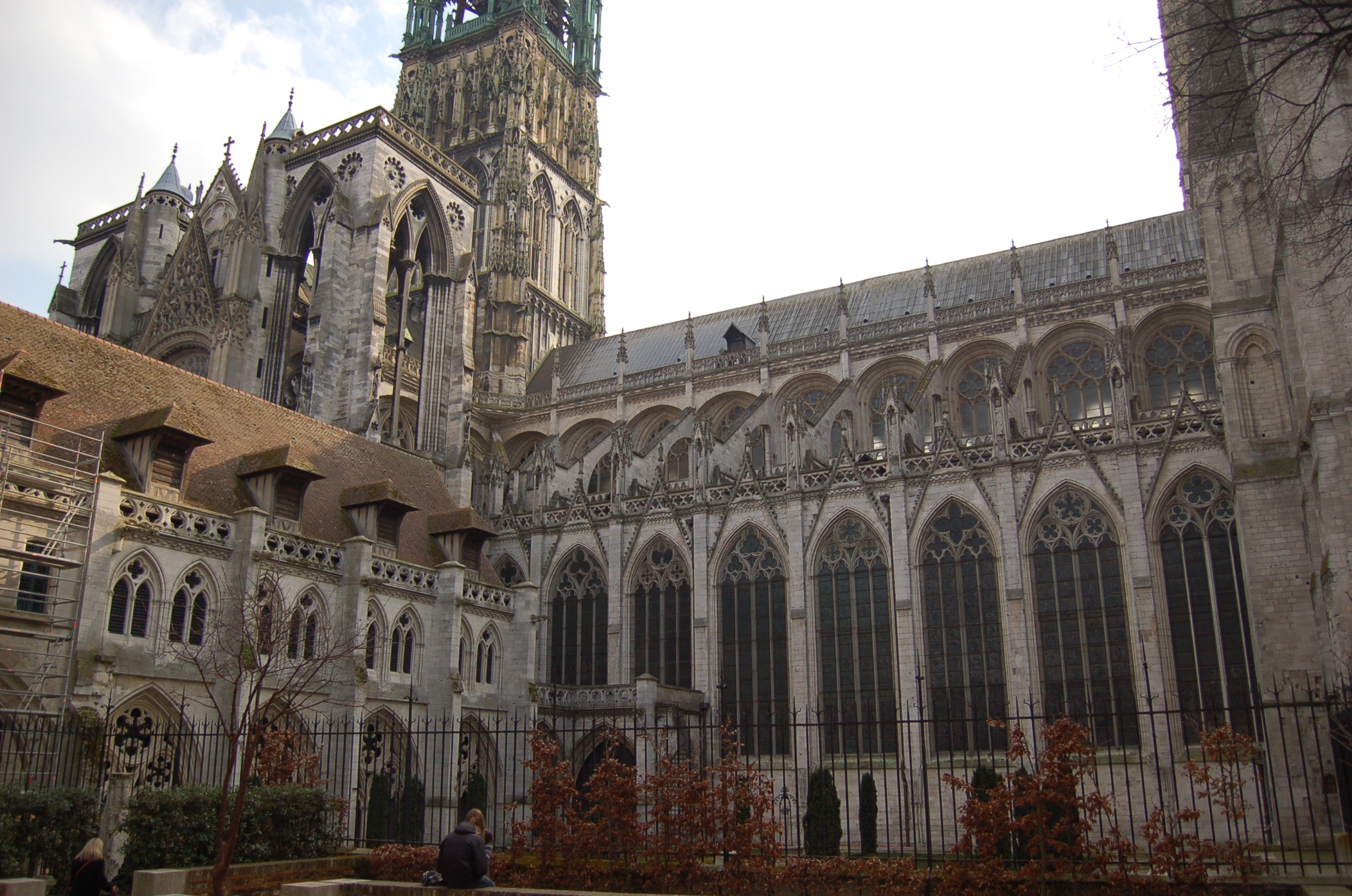 Cathédrale Notre-Dame de Rouen